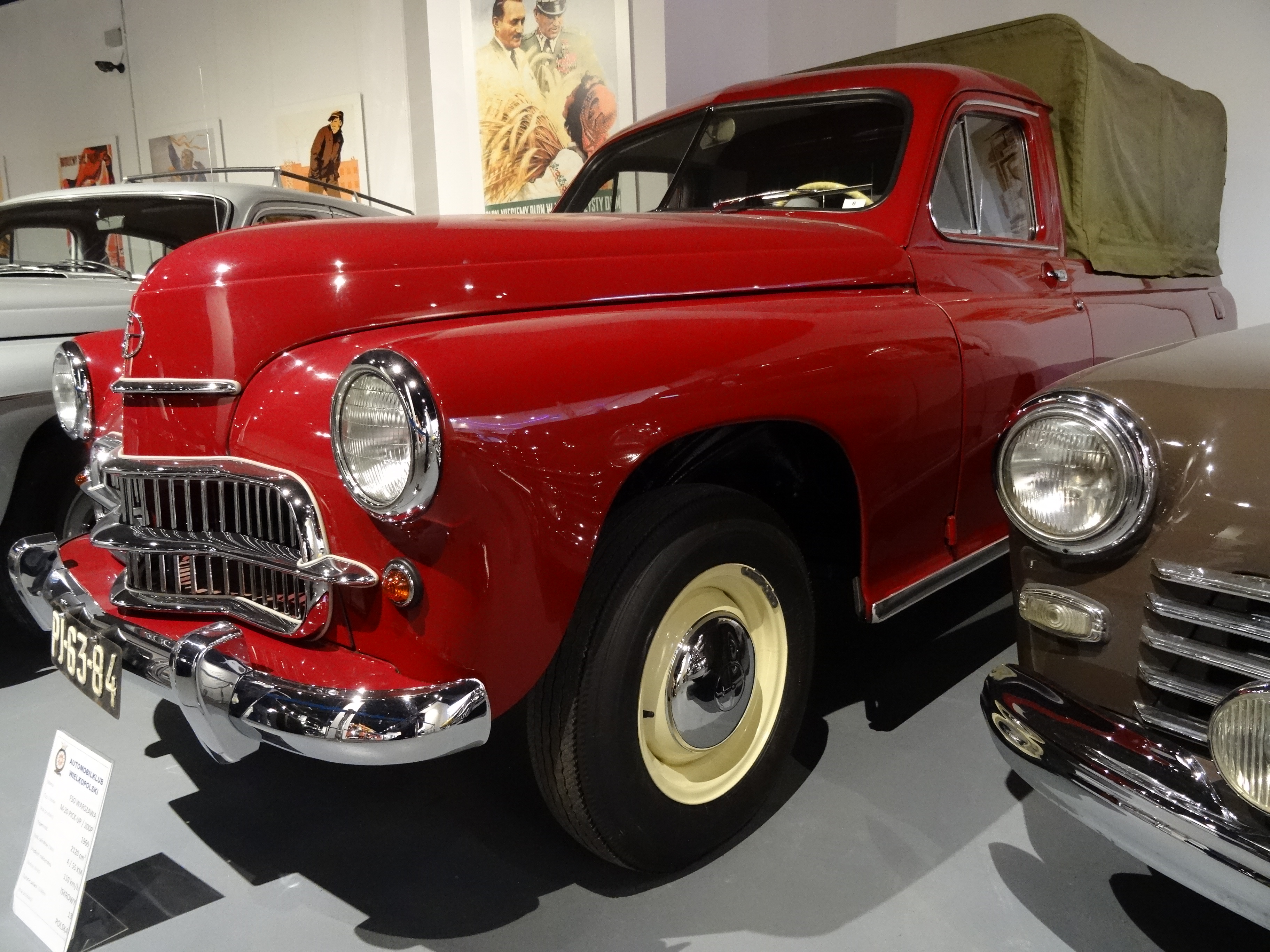 FSO Warszawa M-20 pick-up, Polska, 1960 r.